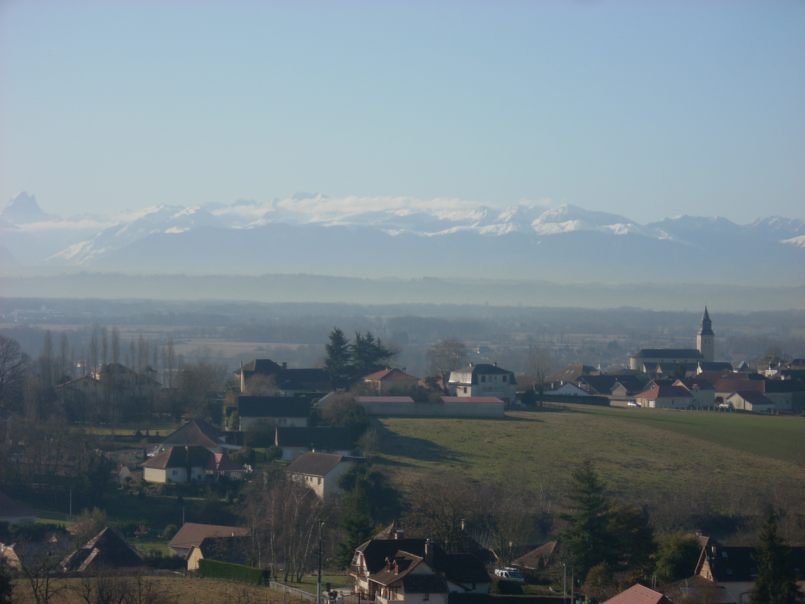 Sauvagnon vue de l'oppidum dans la forêt communale